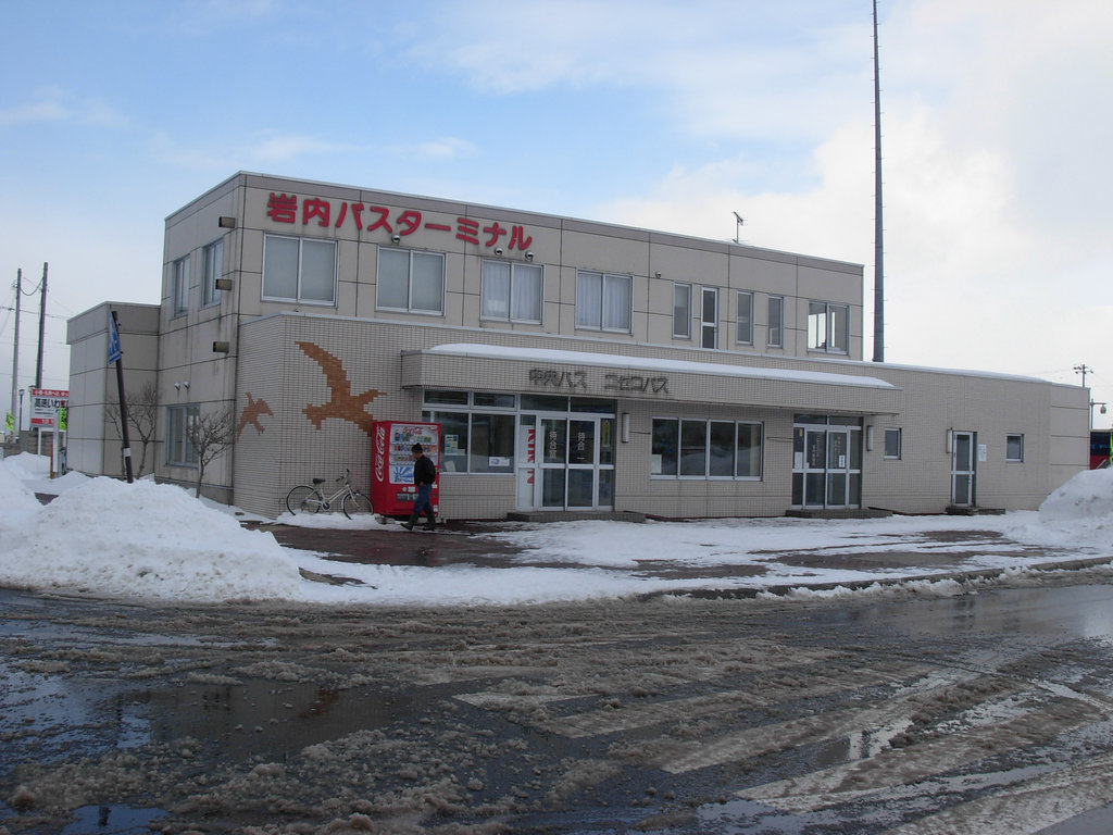 Iwanai bus terminal 岩内ターミナル